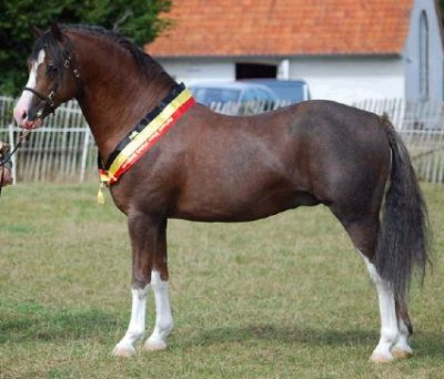 champion supreme welsh